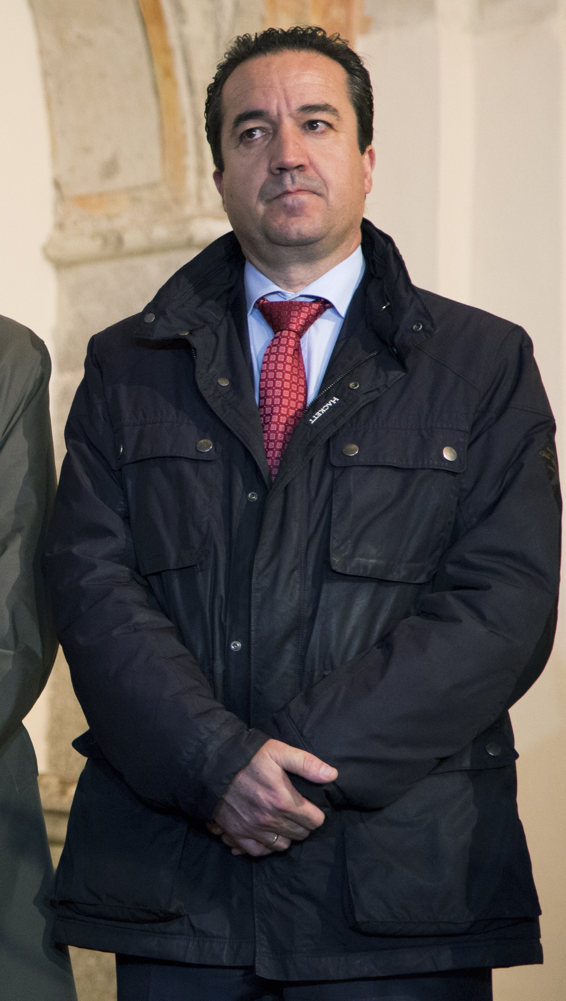 Clausura de Credo